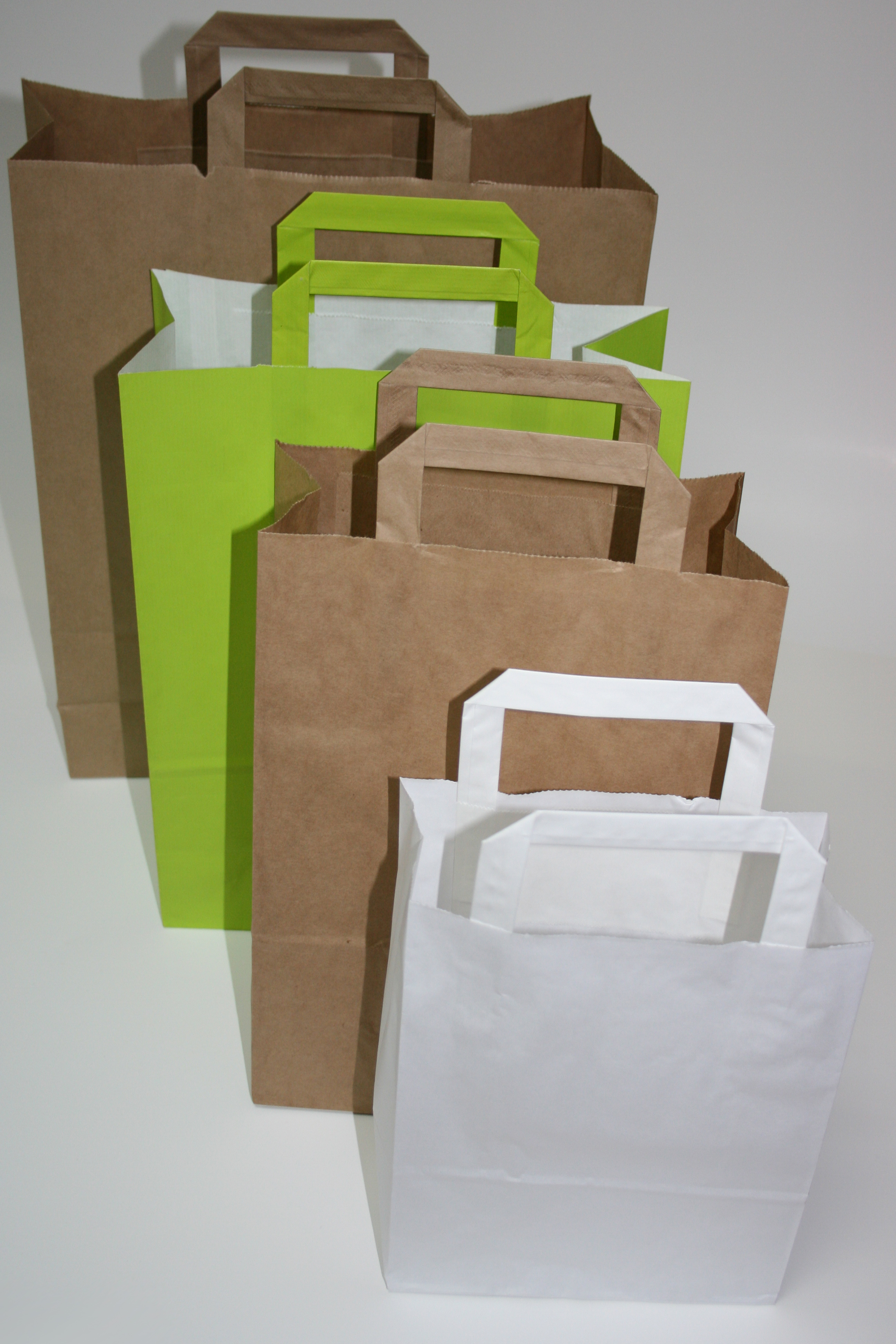 Bolsas de papel con asa plana interior